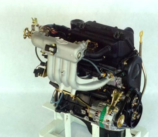 입실론 엔진